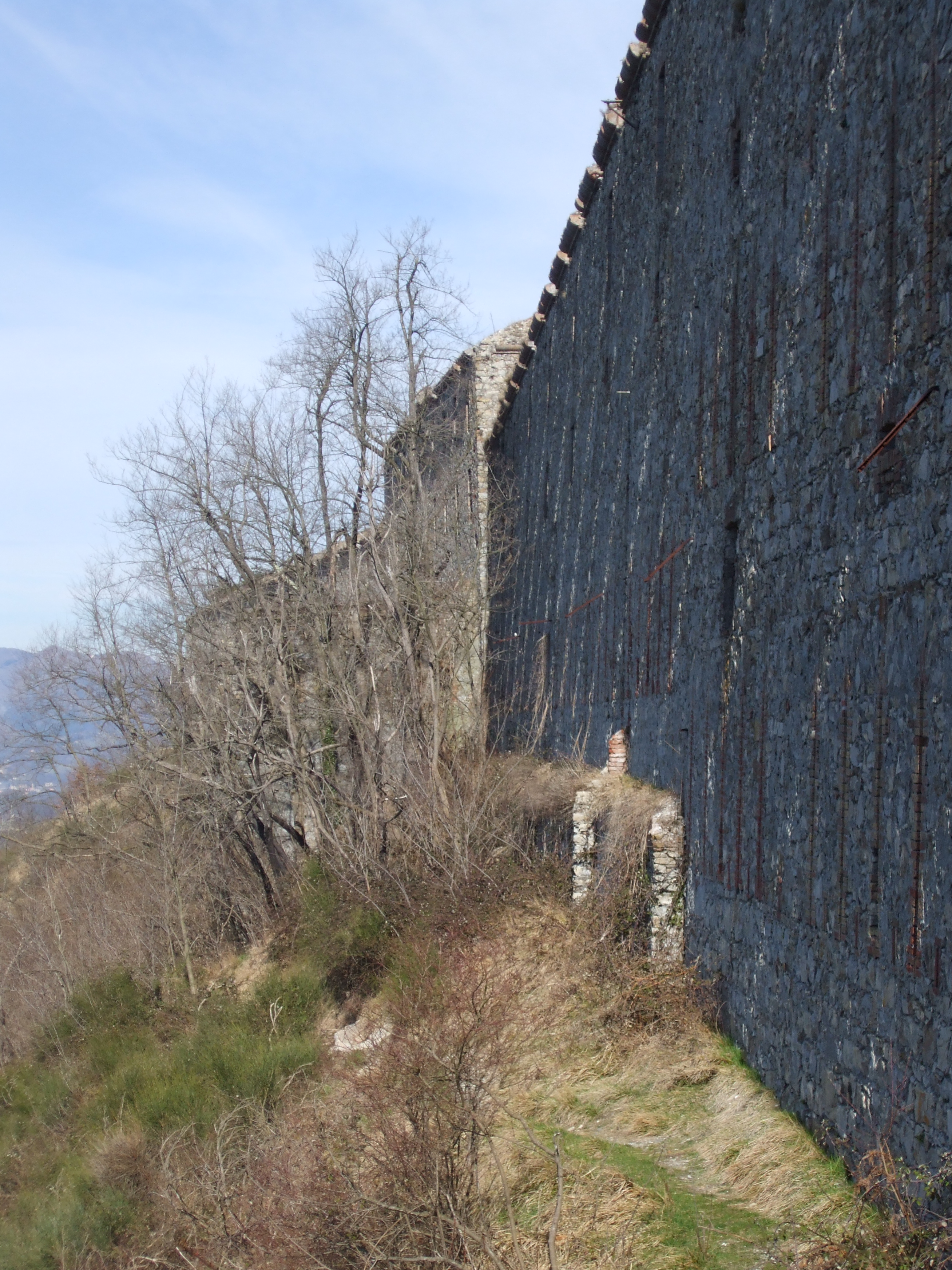 Roberto Manfredi (Riotforlife),fonte personale foto scattata lo 08/03/'09 da Forte Monteratti